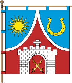 Прапор Солобковецької сільської громади